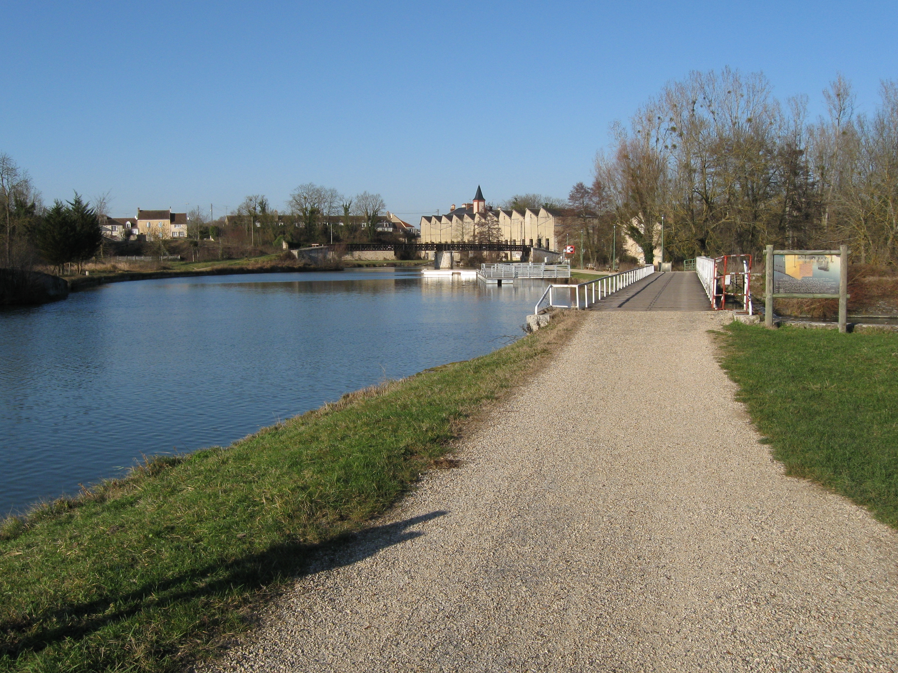 Châlette-sur-Loing. Le canal du Loing. Vue vers le nord-nord-ouest.